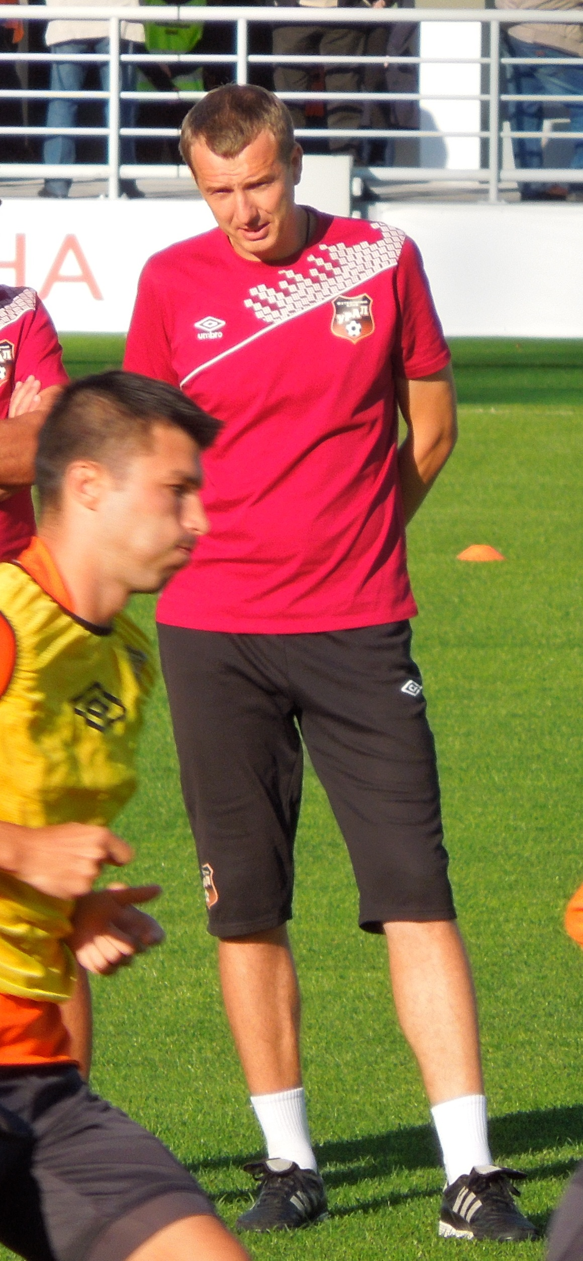 Евгений Аверьянов 8 августа 2015